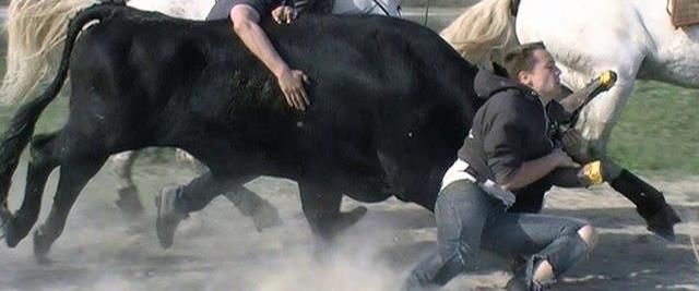 Attrapaïre de taureaux. Un Attrapaïre est un homme, généralement jeune, qui attrape les taureaux de Camargue lors de leur passage au cours des Abrivado et des Bandido.